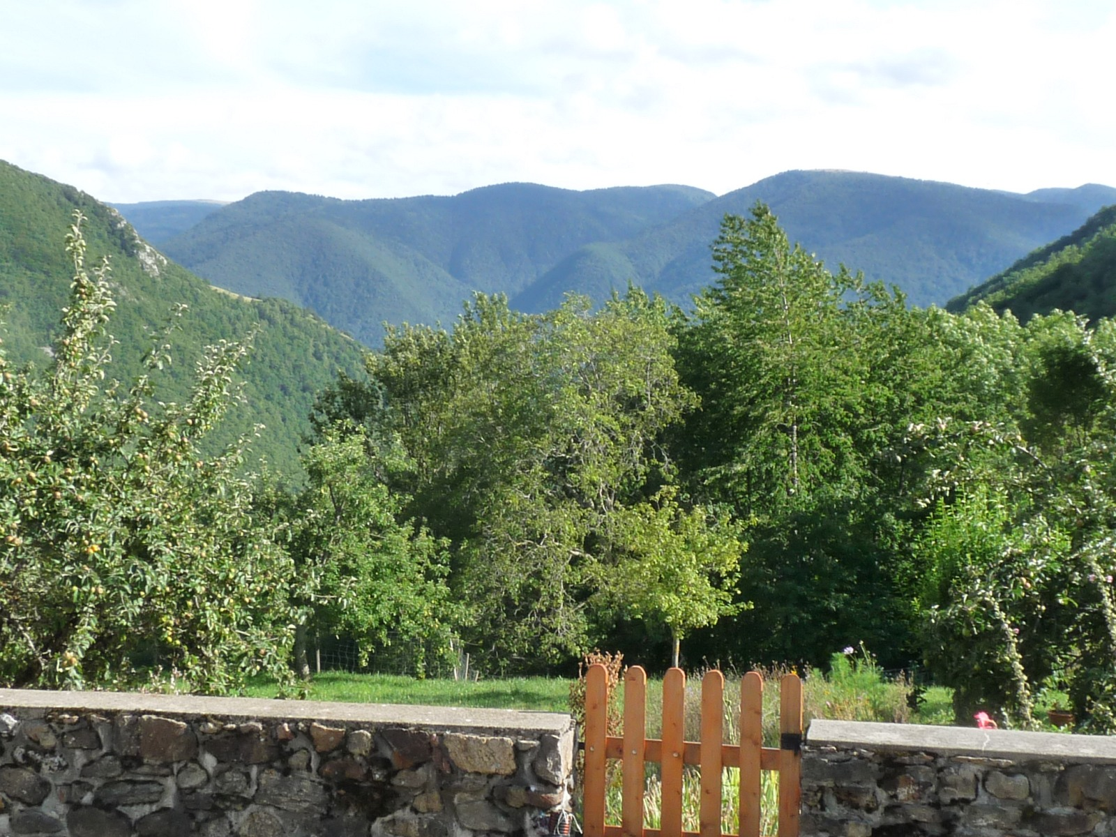 Vue vers le sud depuis le village de Senconac, Ariège, France